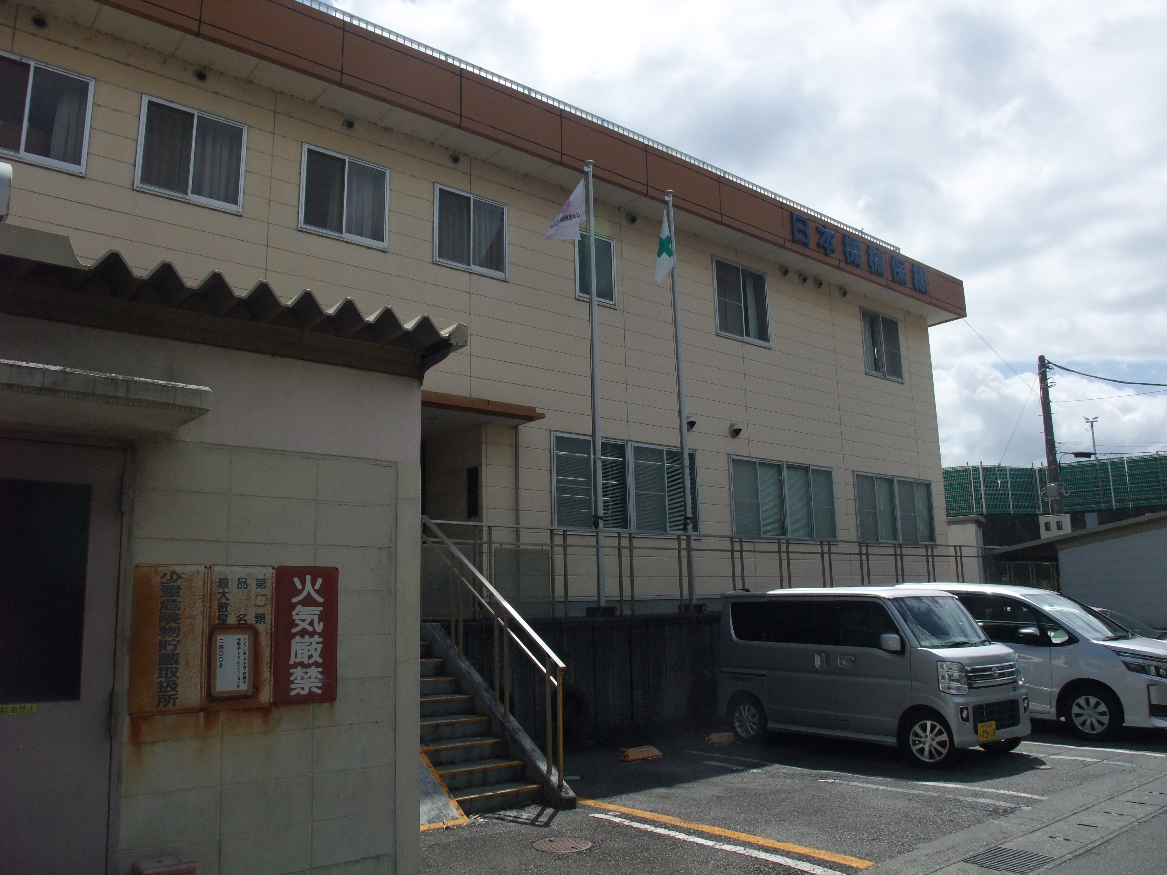 JR東海グループの日本機械保線三島支社ビル